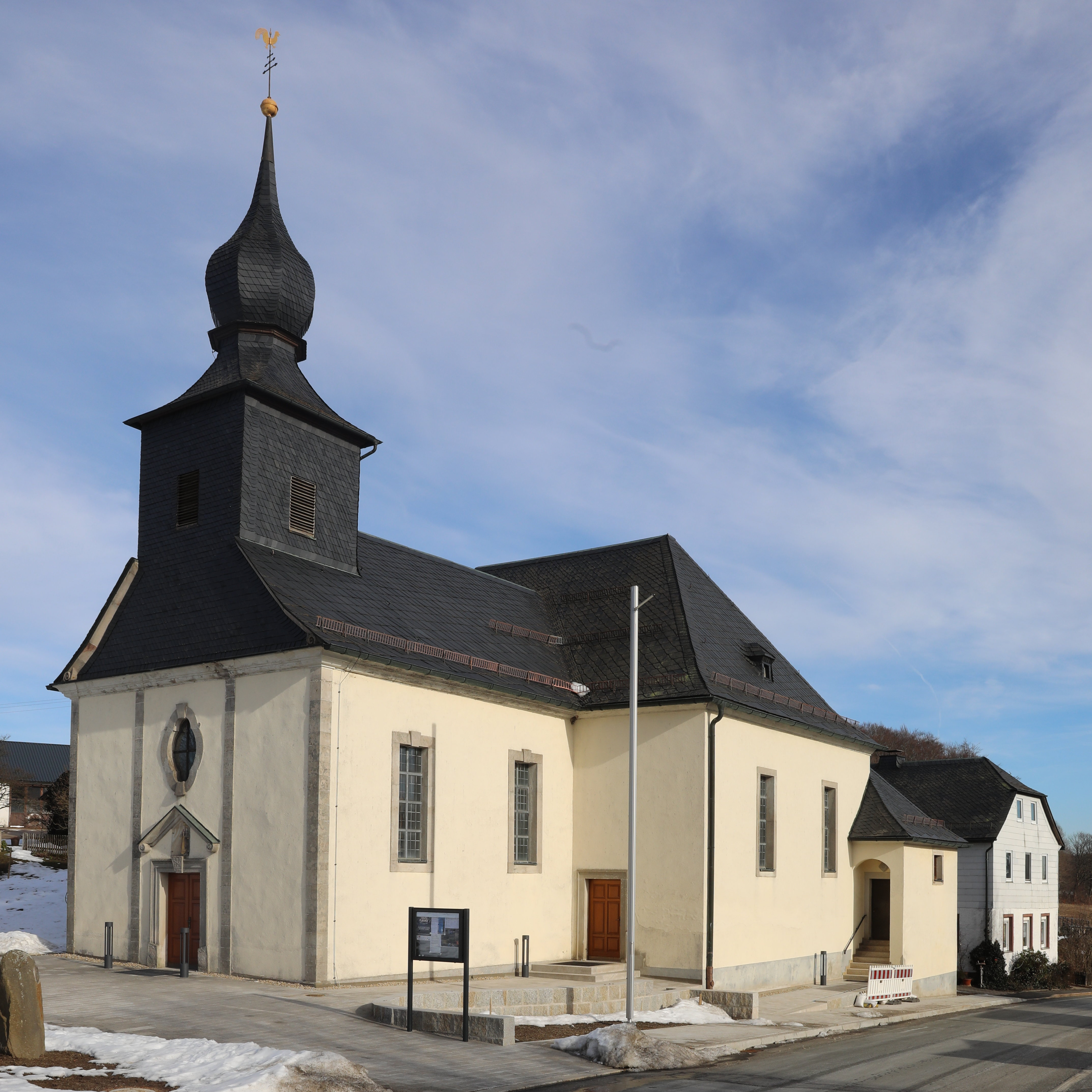 katholische Kirche Mariä-Himmelfahr in Neuengrün